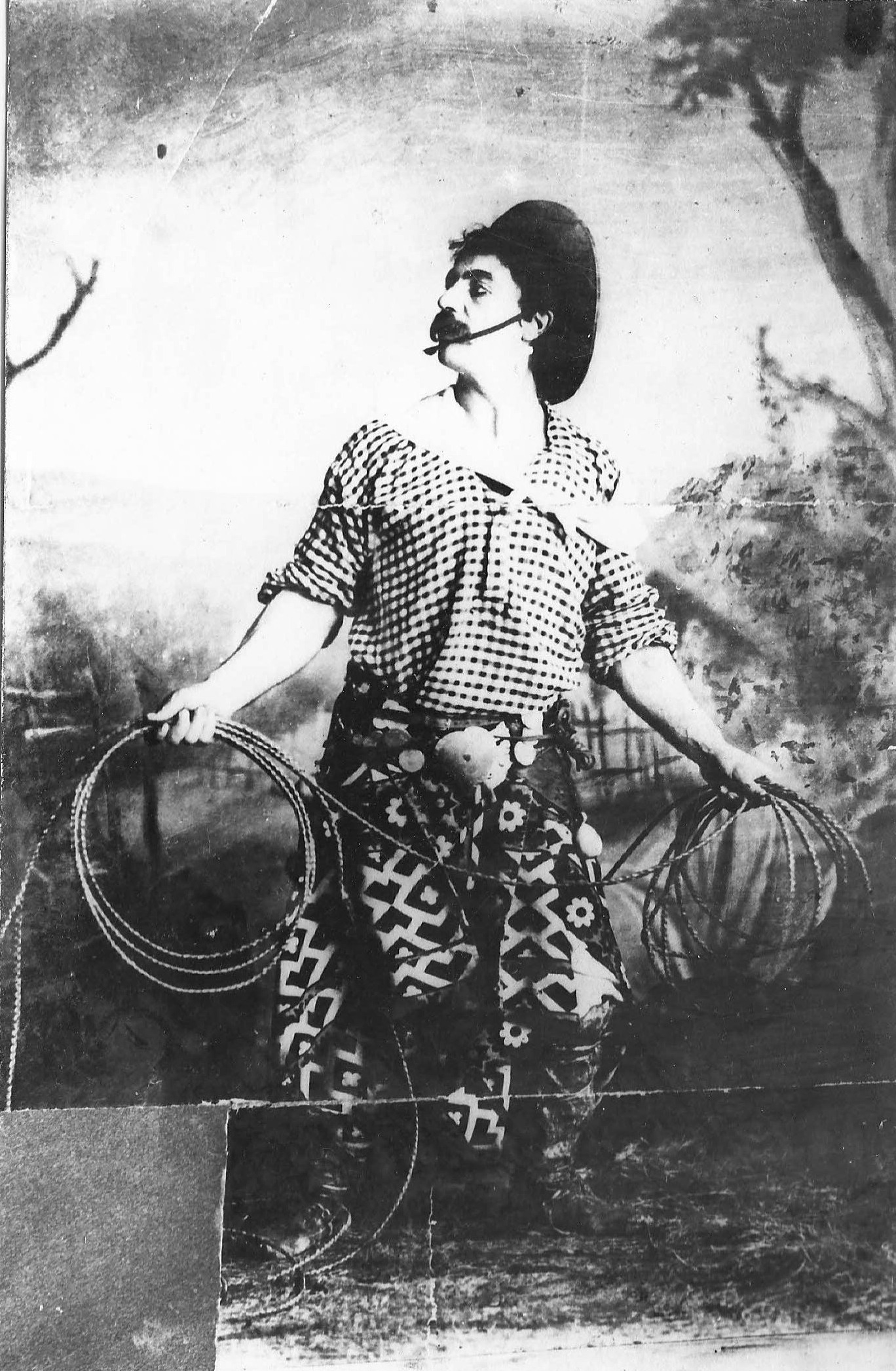 Antonio Podestá en una caracterización gauchesca.